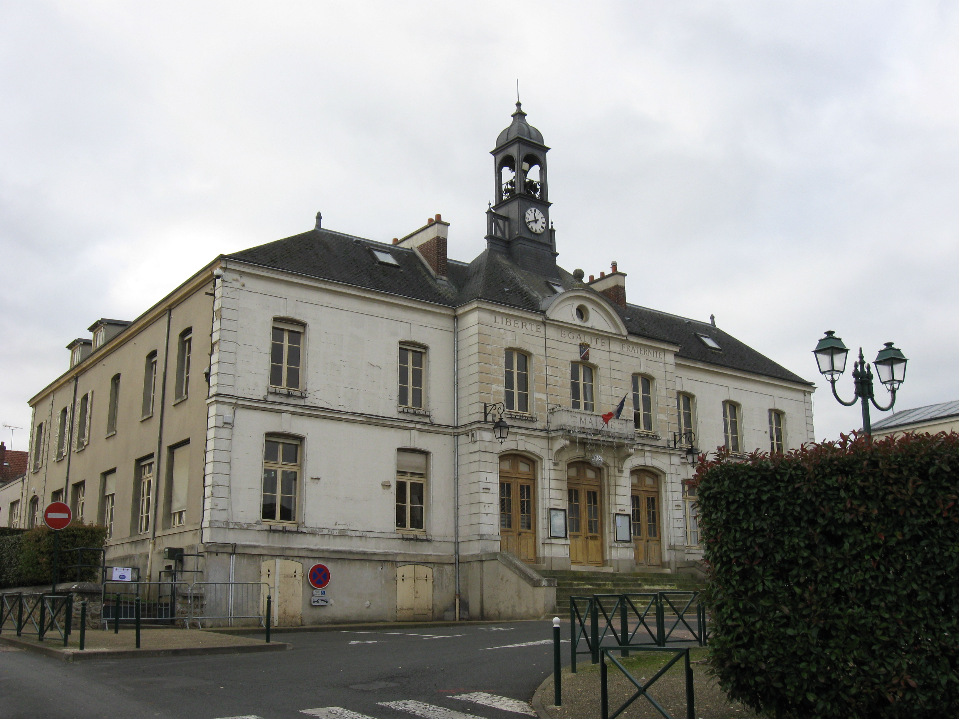 Mairie de Nanteuil-lès-Meaux (Seine et Marne, région Île-de-France).